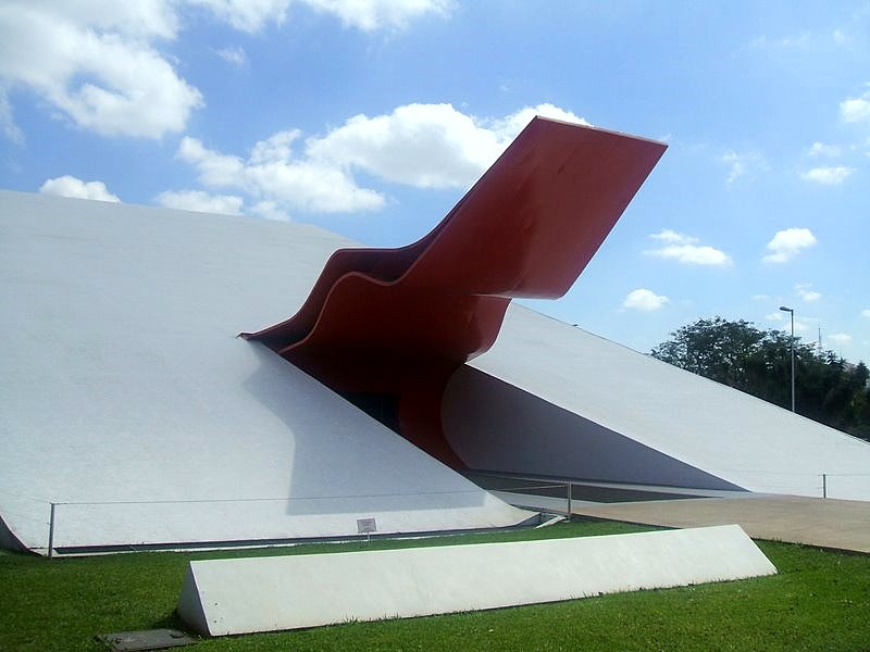 Auditório Ibirapuera, no parque homônimo de São Paulo, Brasil.